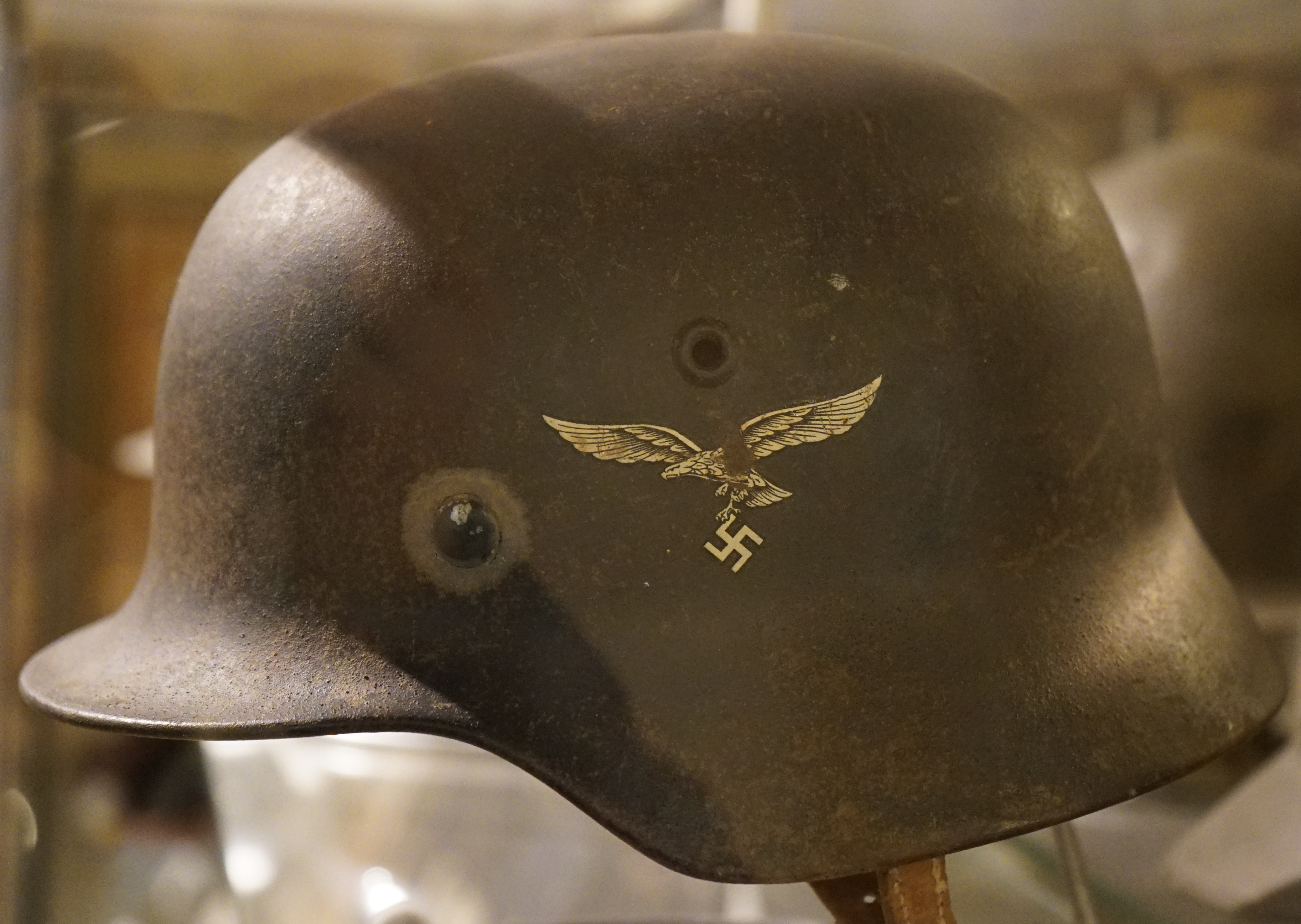 présenté au musée de Toul.